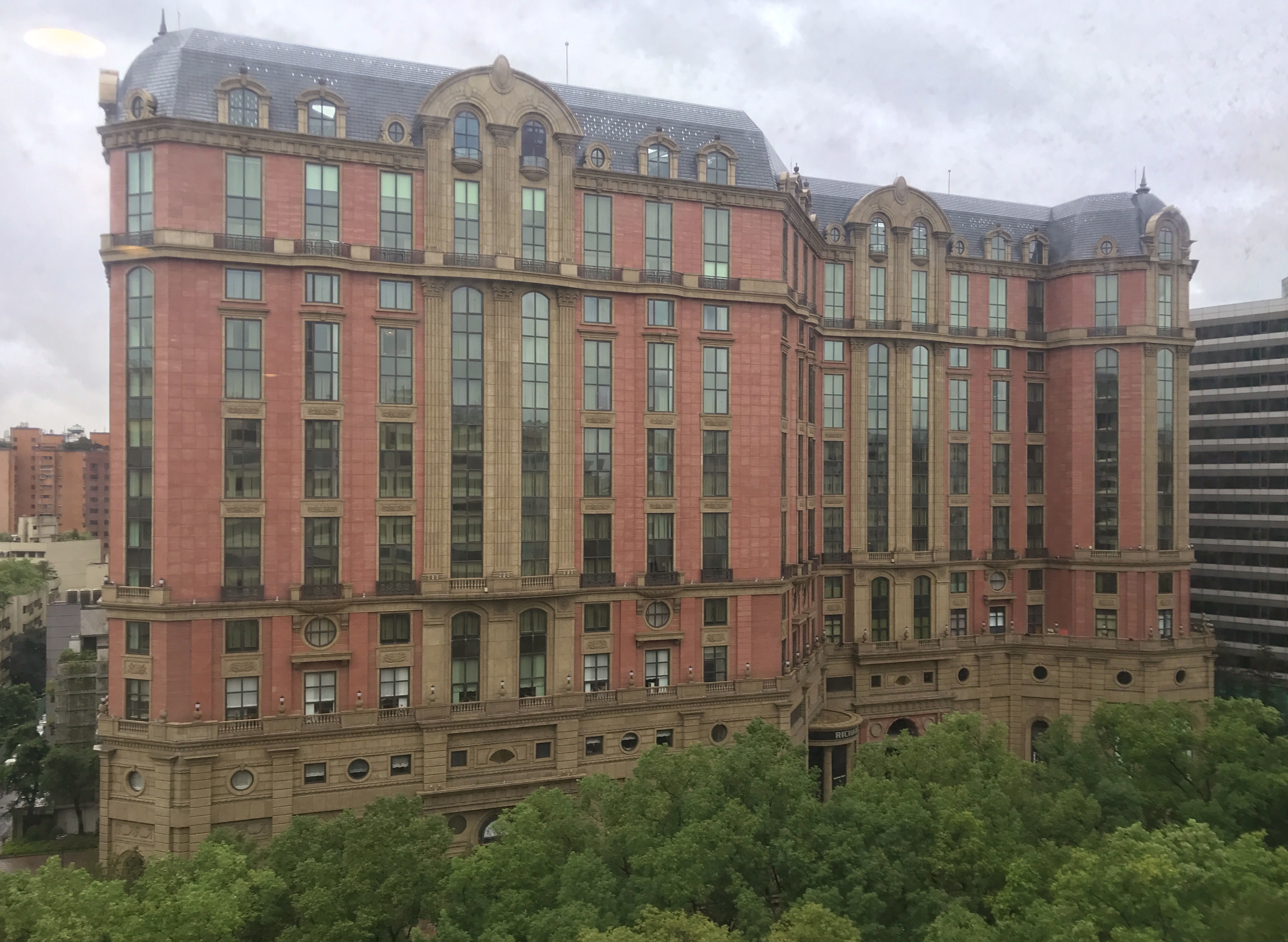 台北文華東方酒店，攝於臺北長庚醫院前棟10樓33病房。